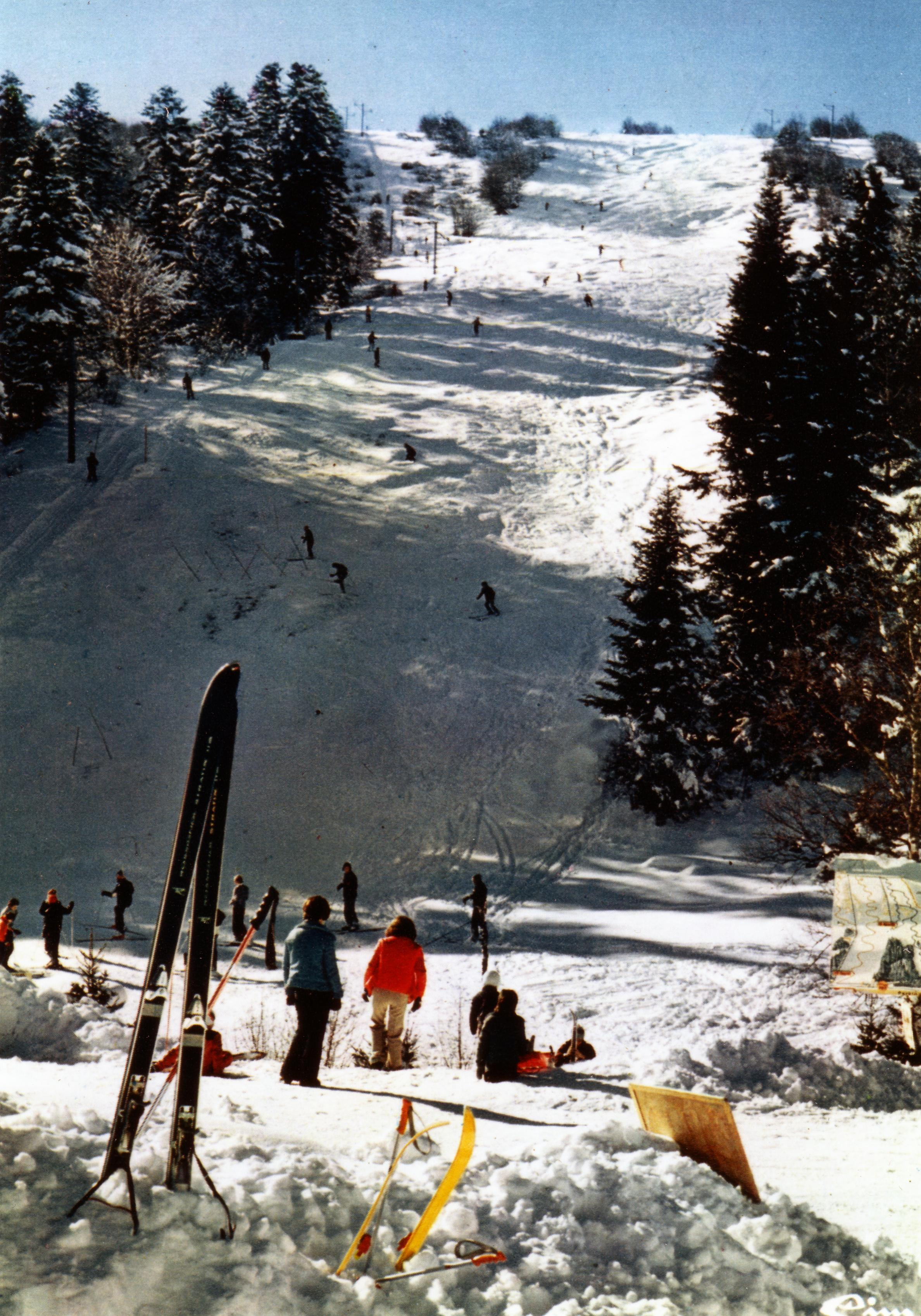 Une vue sur le bas de la Haute Vallée, avec sur la gauche le téléski des Myrtilles.